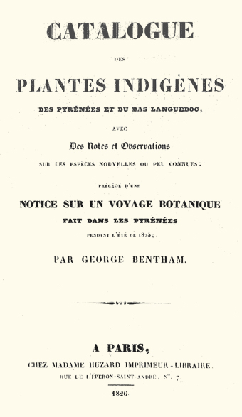 Sujet : Page de titre de George Bentham. Source : couverture de l'édition de 1826, illustration du domaine publique. Licence